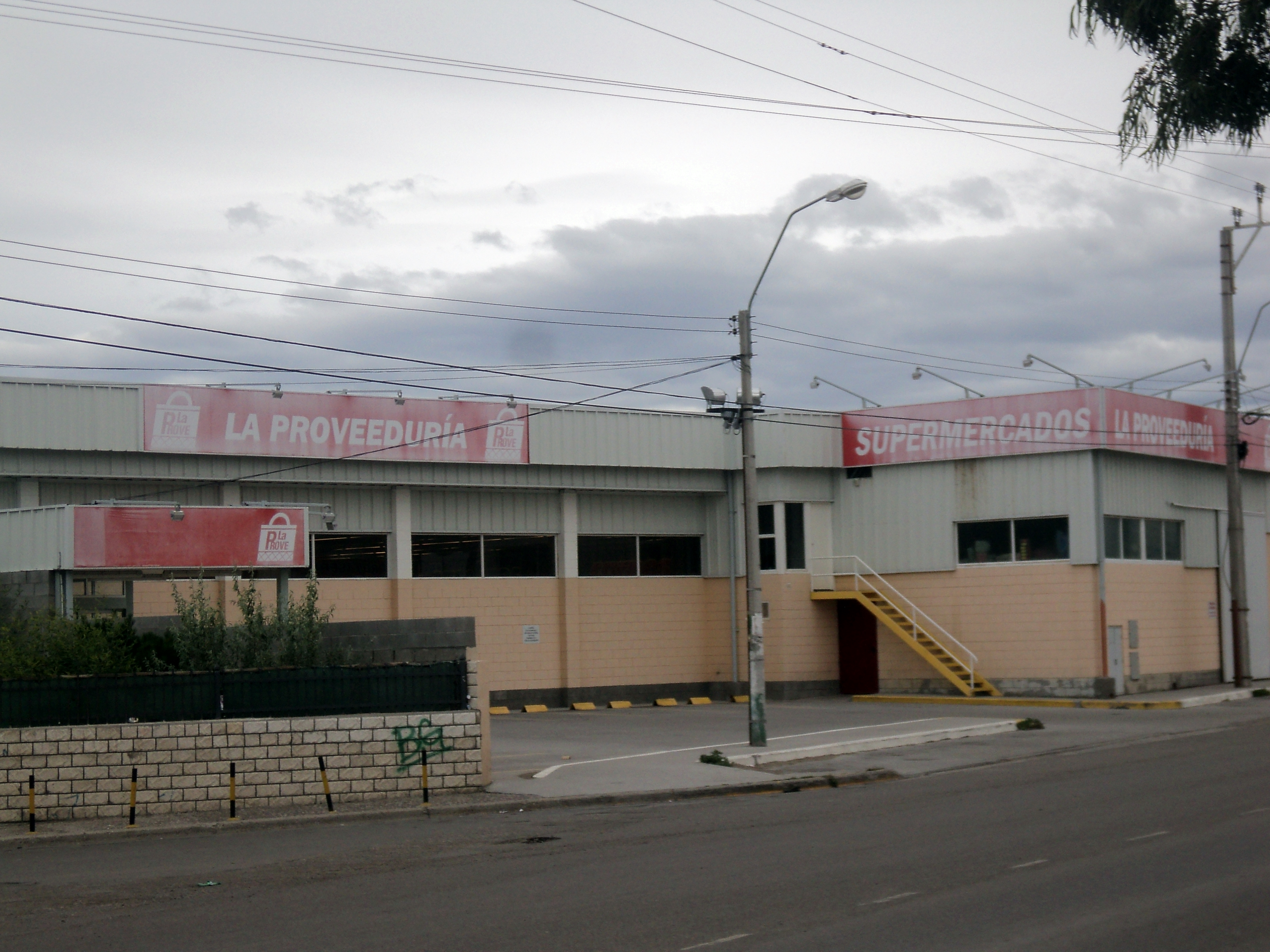 La Provee con su sucursal más boreal en Km8